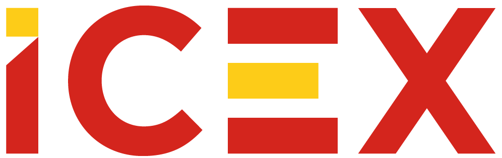 Logotipo del Instituto Español de Comercio Exterior